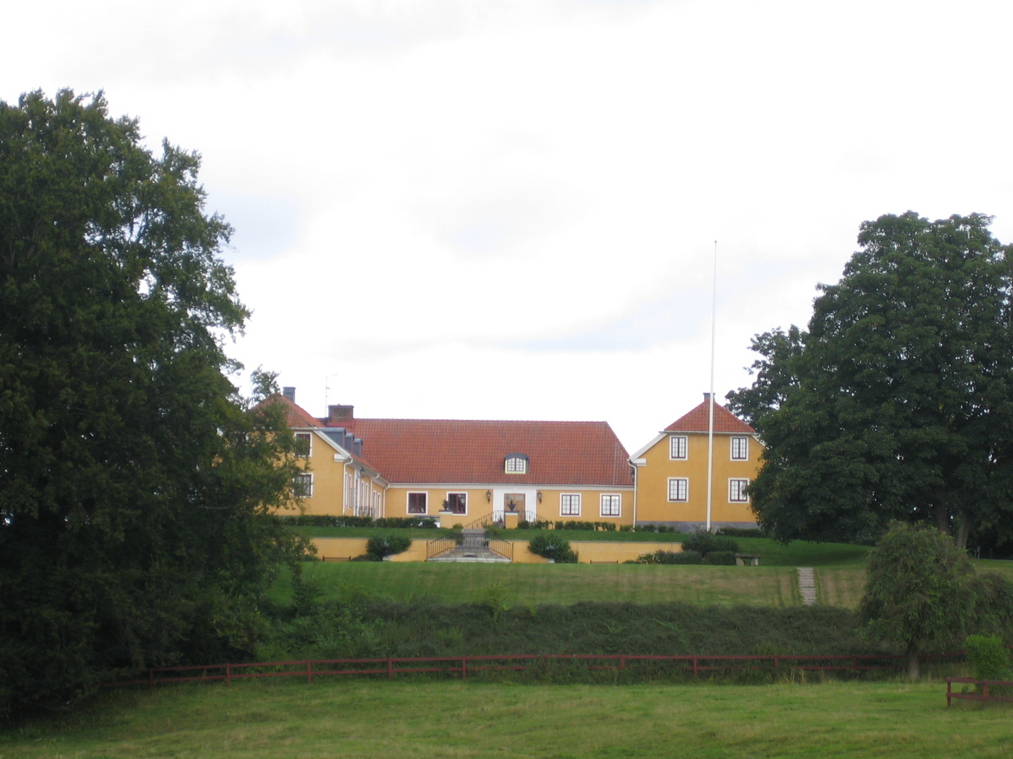 Näsbyholms slott. Bilden tagen av mig själv 28 augusti 2005